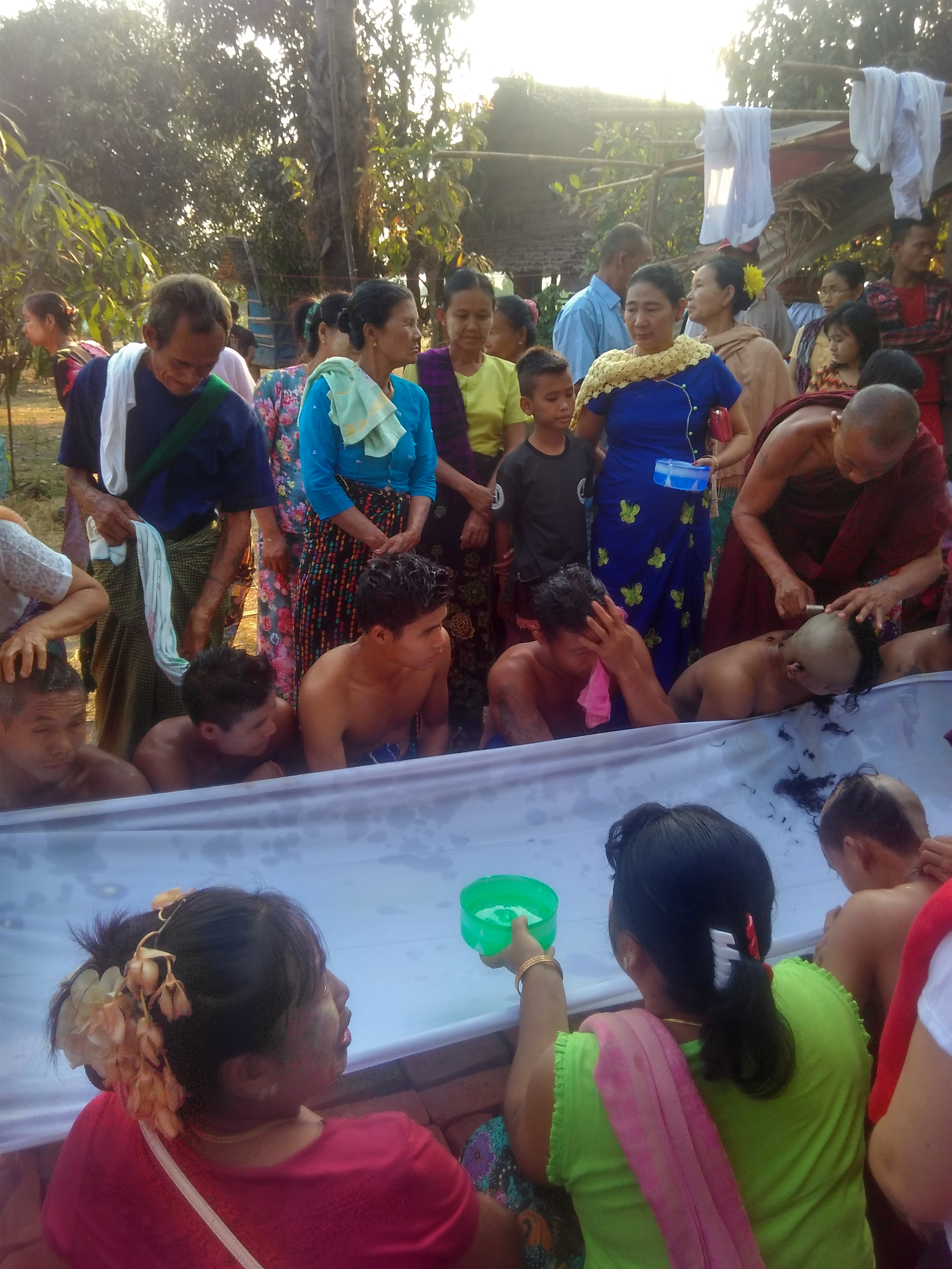 ဆံချခြင်း